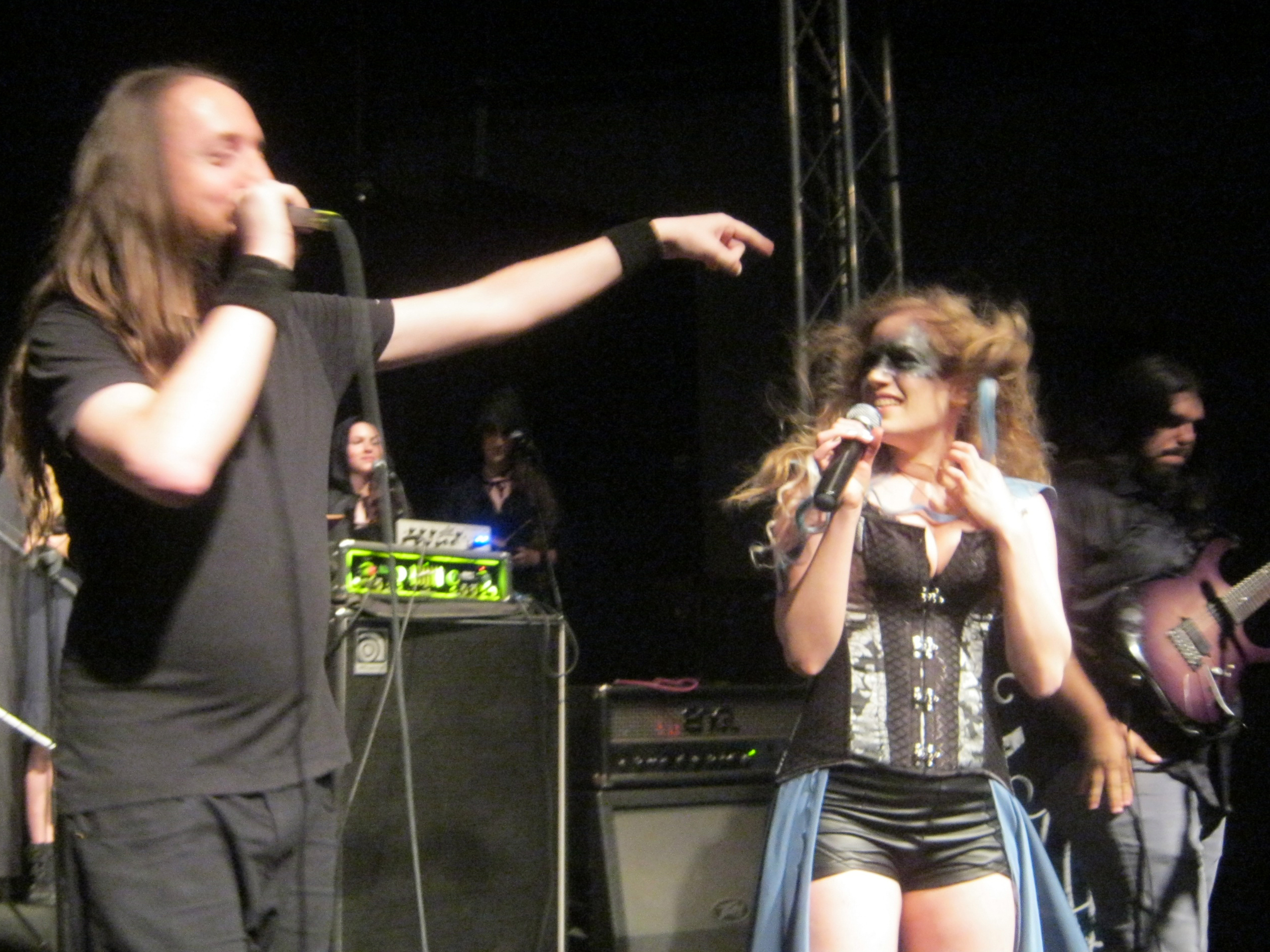 Prey For Nothing Vs Scardust - Metal Fight 02.06.16, Israel